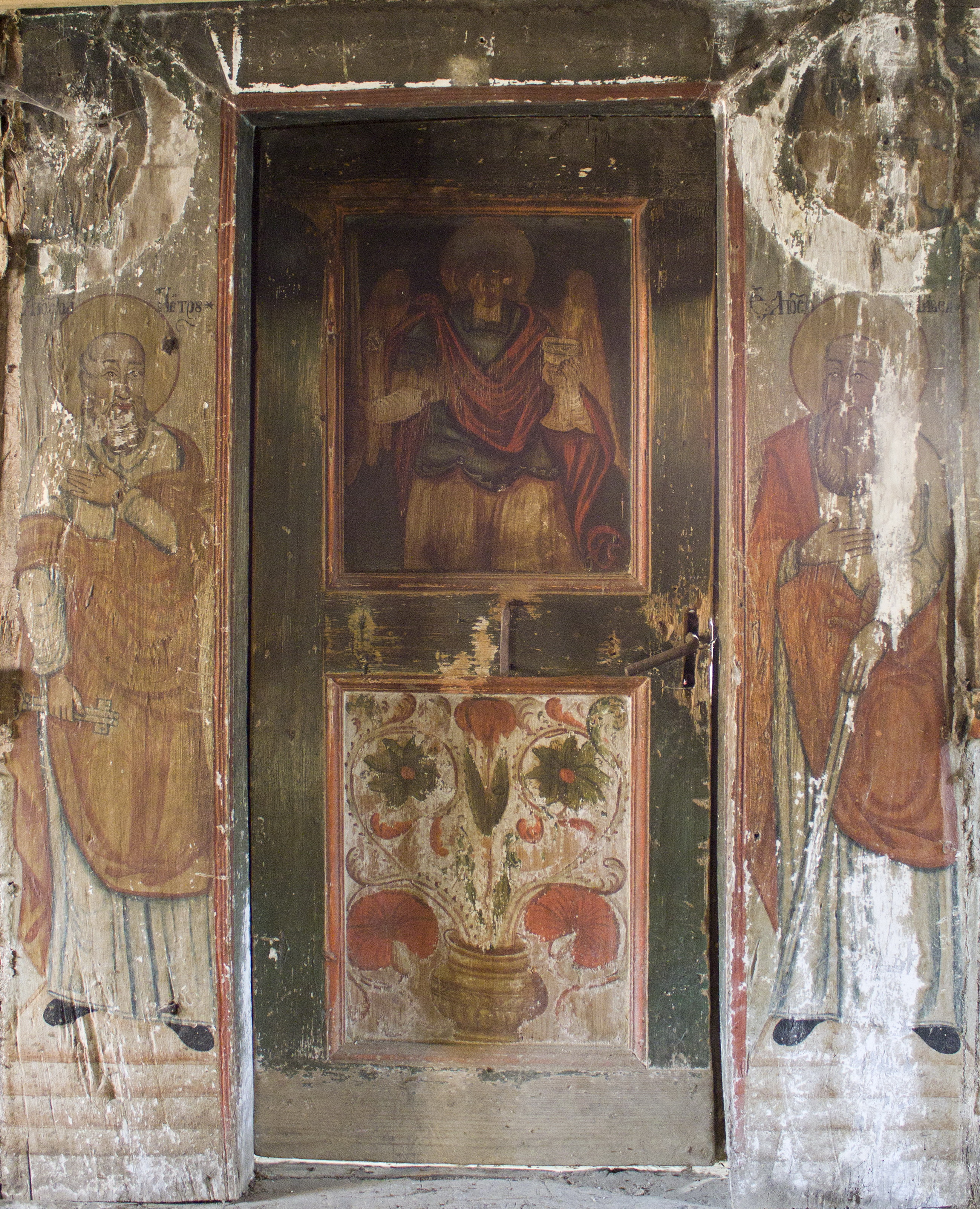 Biserica de lemn din Solomon, judeţul Sălaj.